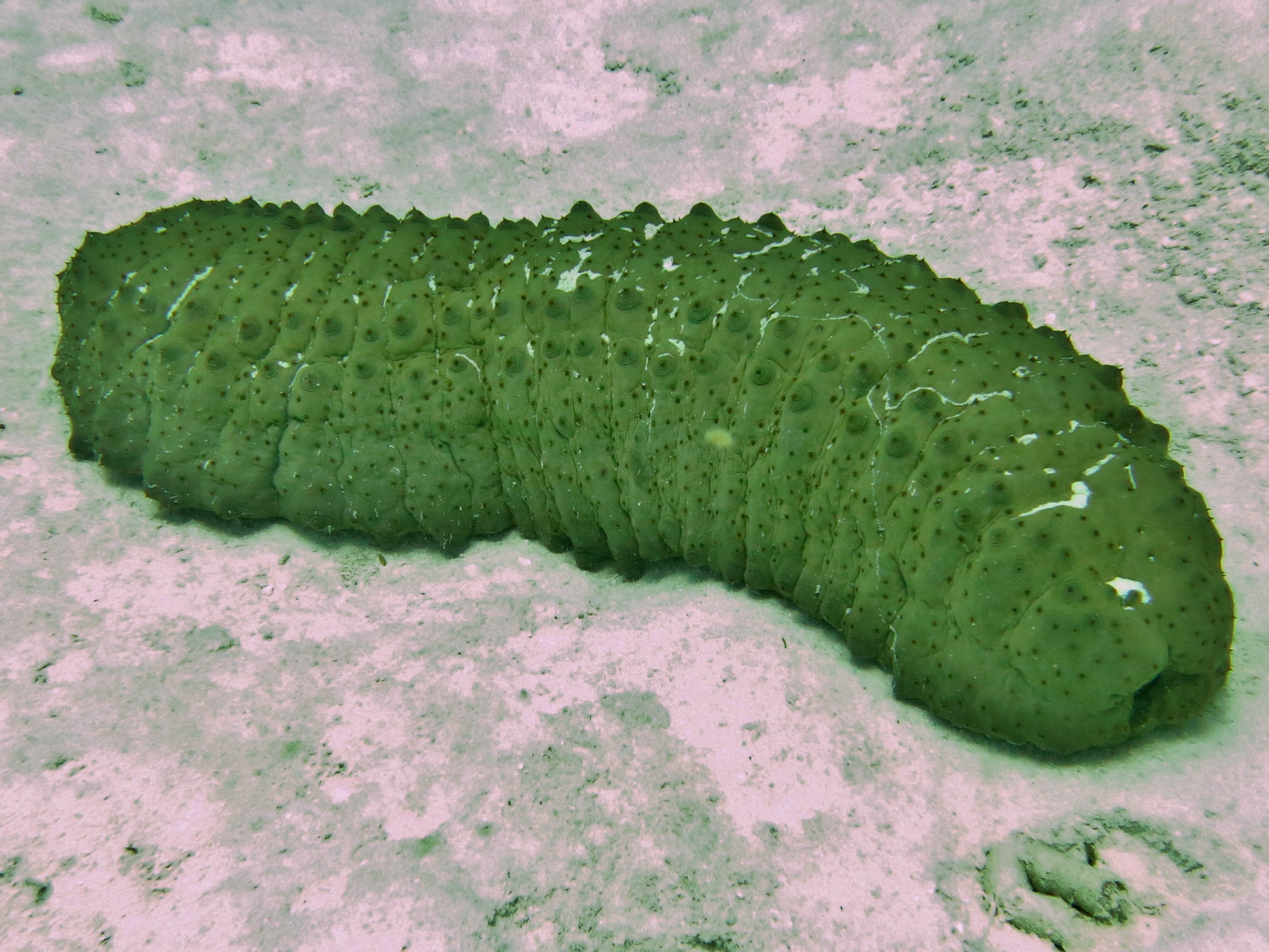 Une holothurie de Herrmann (Stichopus herrmanni), aux Maldives (Landaagiraavaru, atoll de Baa).